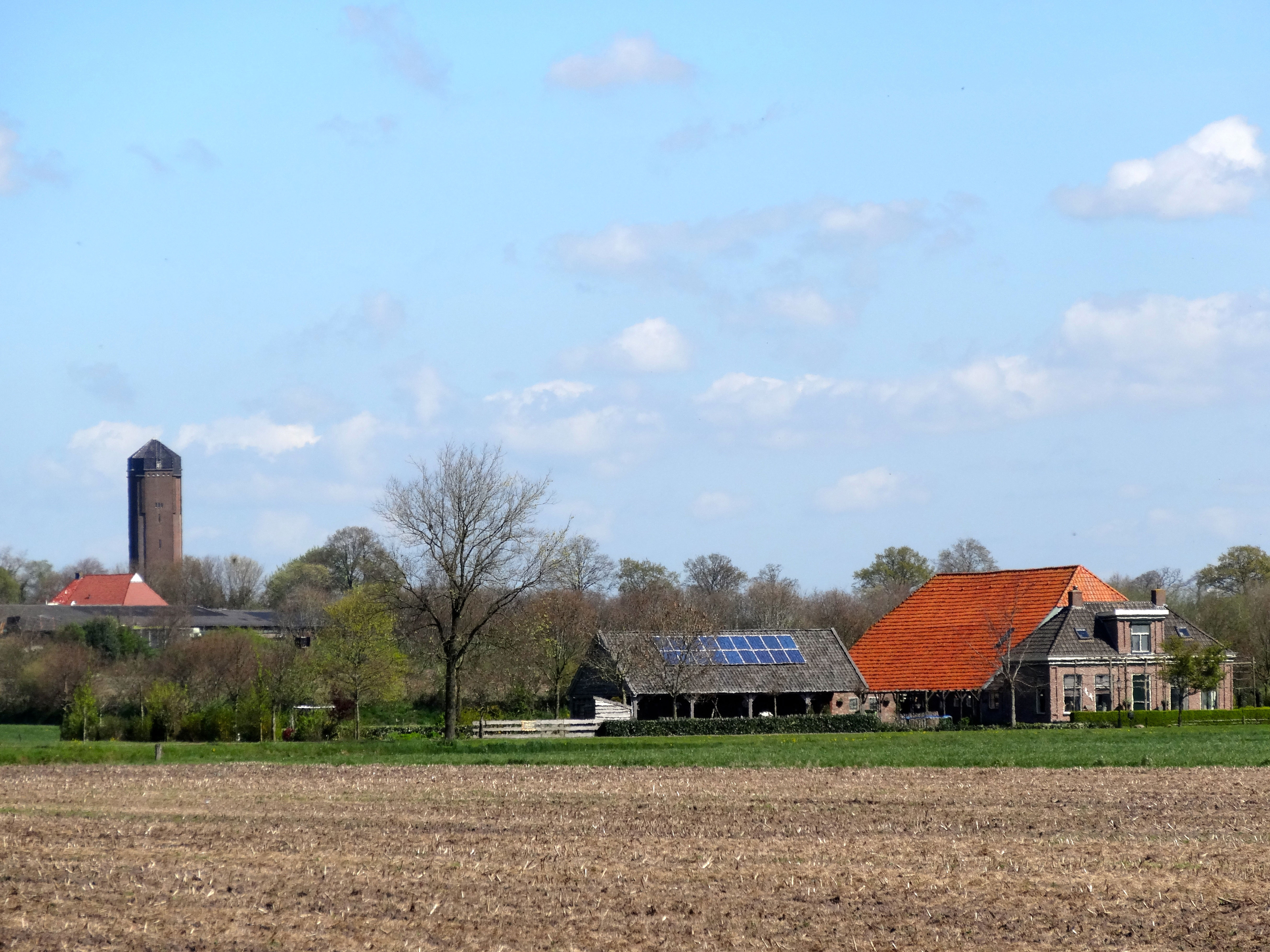 Zicht op de Watertoren van Tuk, gezien vanuit het zuidwesten